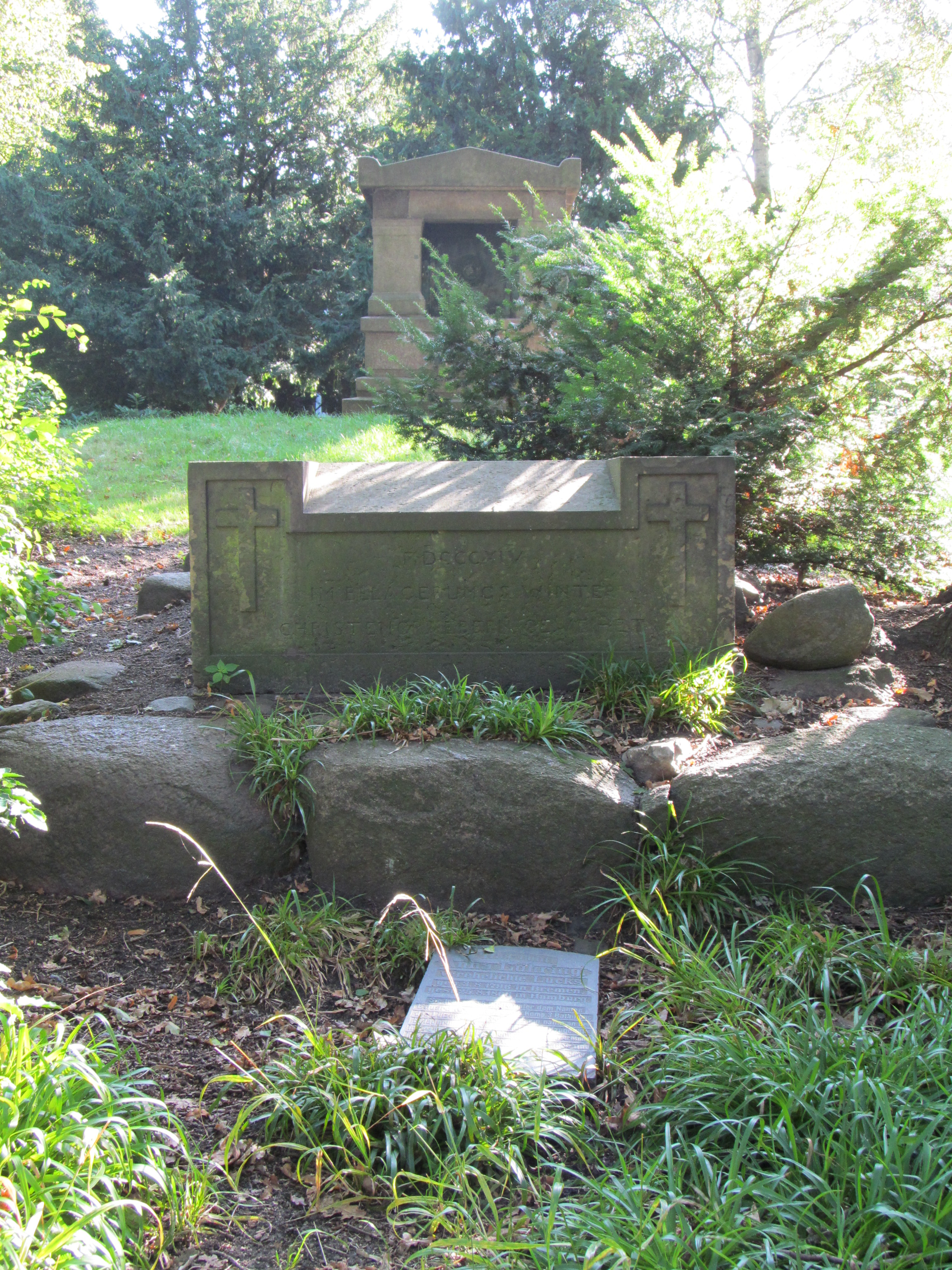 Alter Hammer Friedhof in Hamburg-Hamm: Gedenkstein für die Opfer des "Belagerungswinters 1813/14", davor das Grabmal der Freiheitskämpferin Anna Lühring, im Hintergrund das Sieveking-Mausoleum